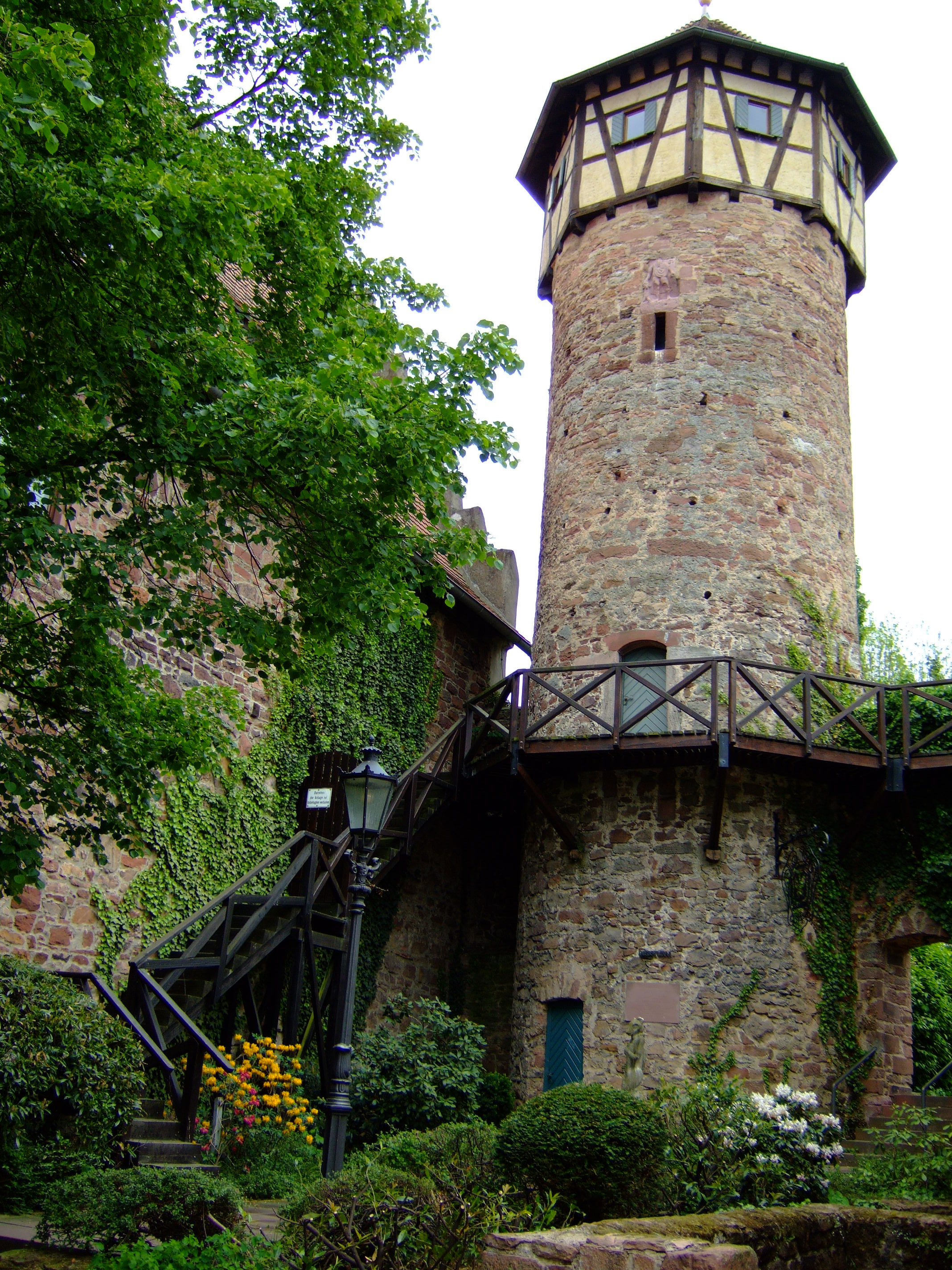 "Diebsturm" der Burg Michelstadt (Kellerei)